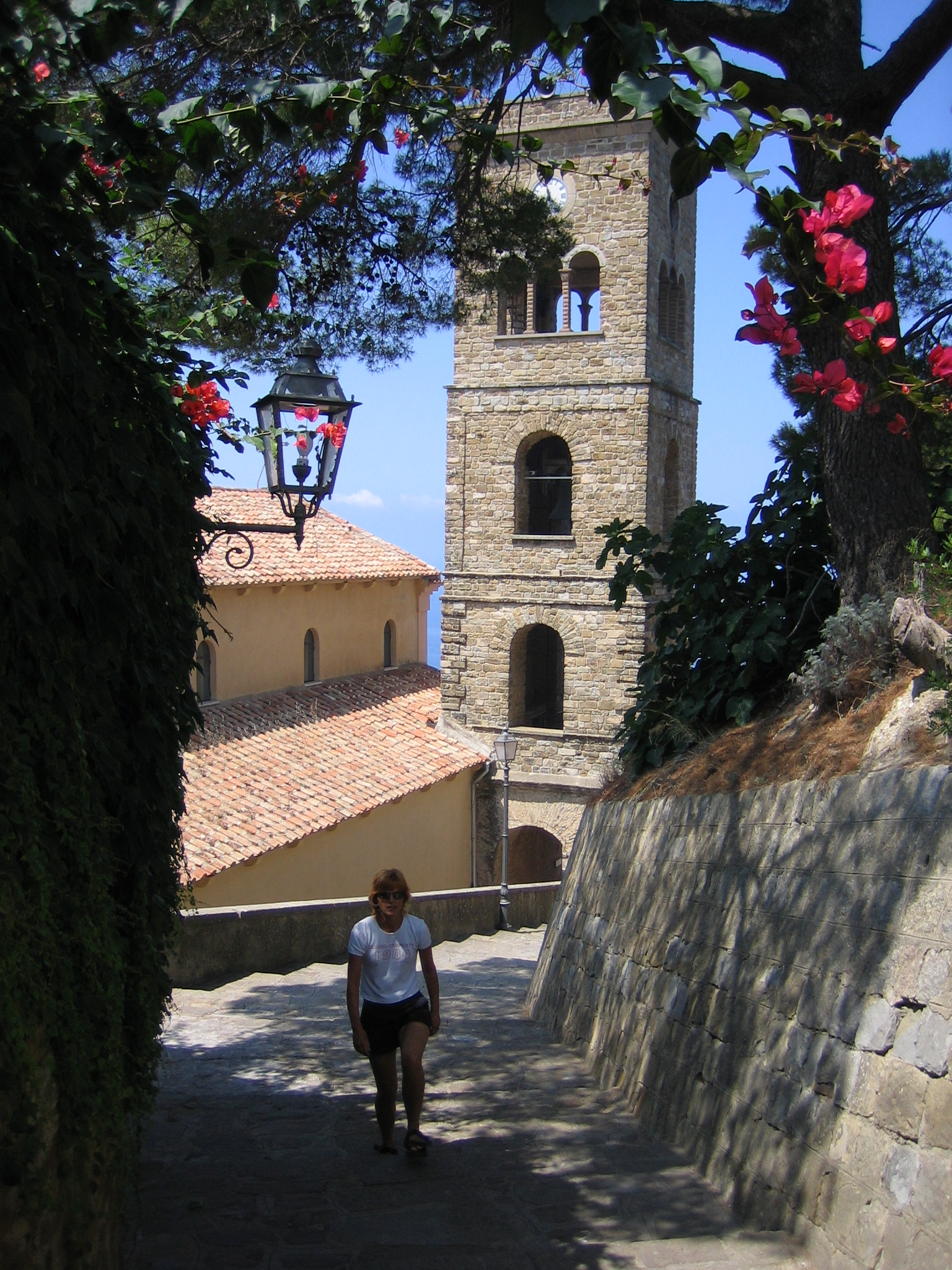 Kirche von Castellabate, Kampanien, Italien